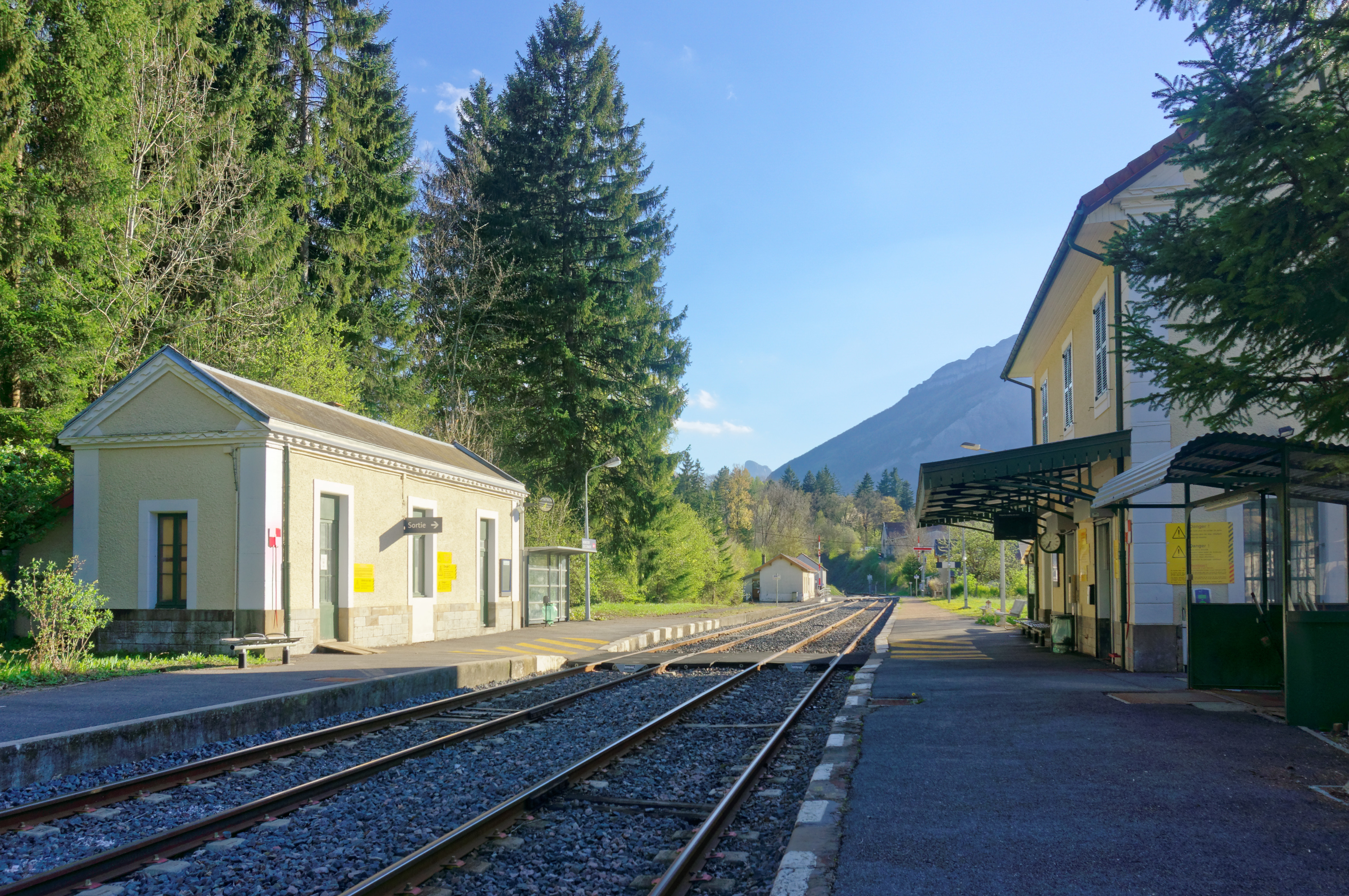 Voies vers Gap en gare de Monestier-de-Clermont